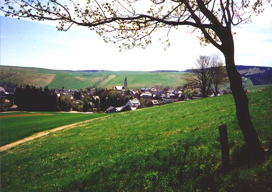 Blick auf Oberwiesenthal